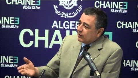 Abdeslam Bouchouareb Ministre de l’Industrie et des Mines, le 30 juillet 2015 à la Radio Algérienne